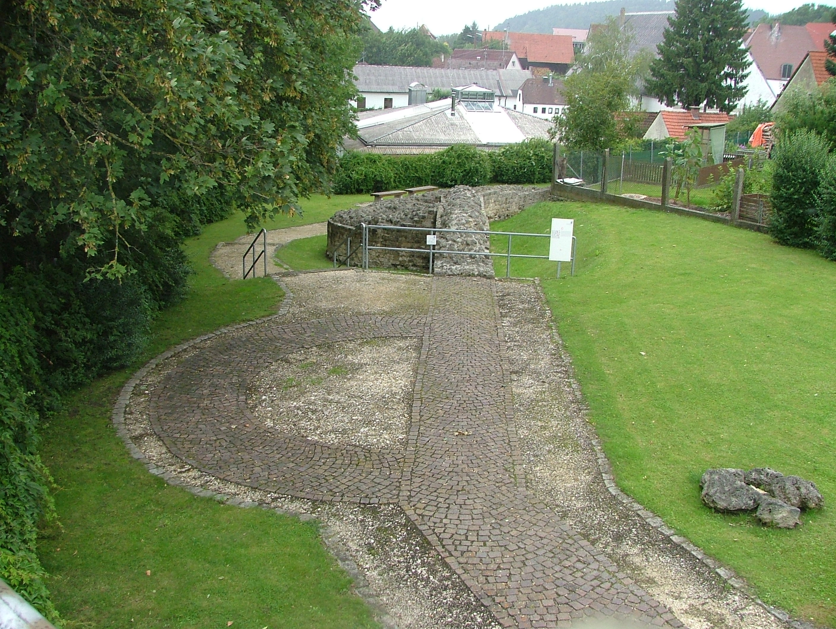 Kellmünz